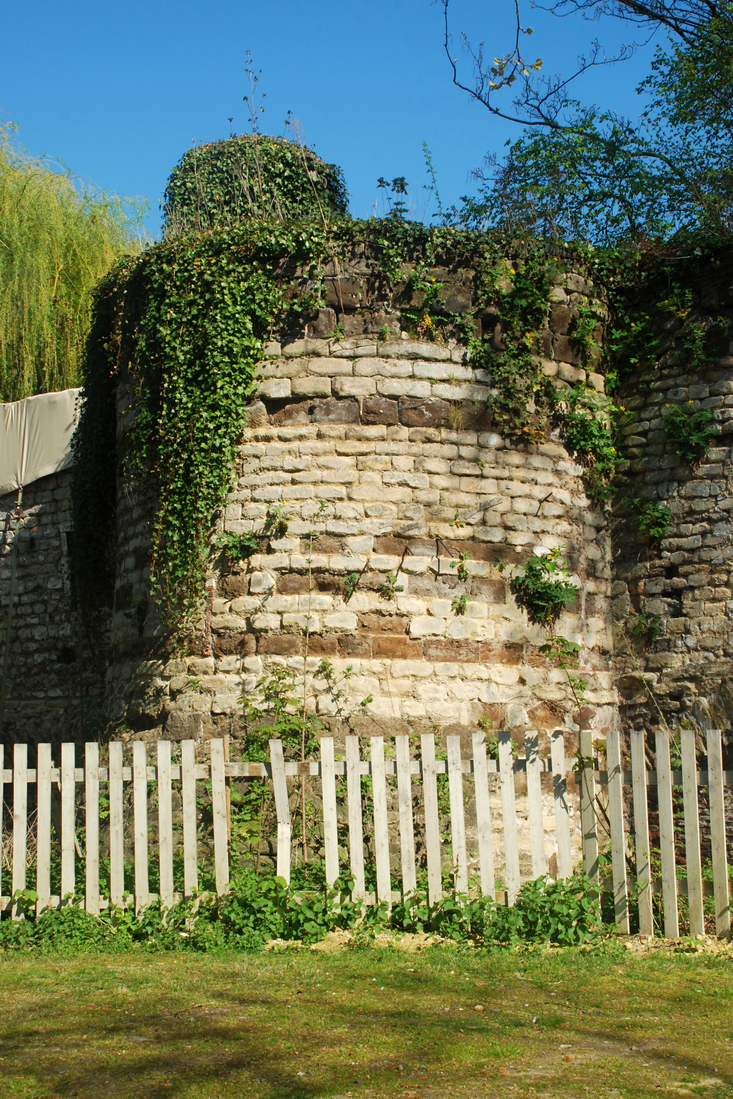 Belgique - Brabant flamand - Première enceinte de Louvain - Handbooghof - tour nord